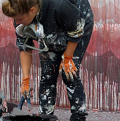 Maja Hürst beim Bemalen einer Fassade (2013)